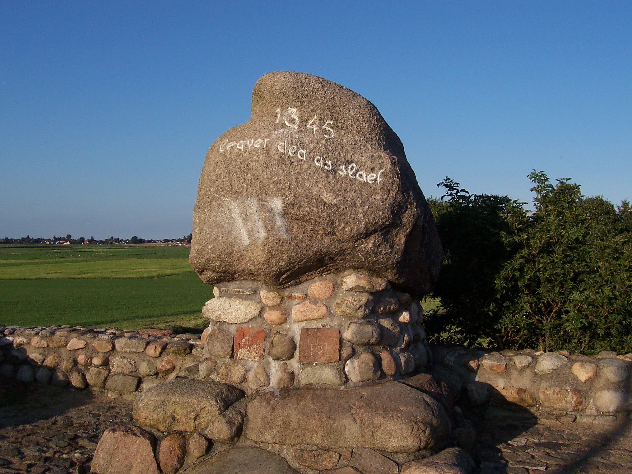 Warns: Denkmal der Slacht bei Warns in 1345 - Lieber tot als Sklave